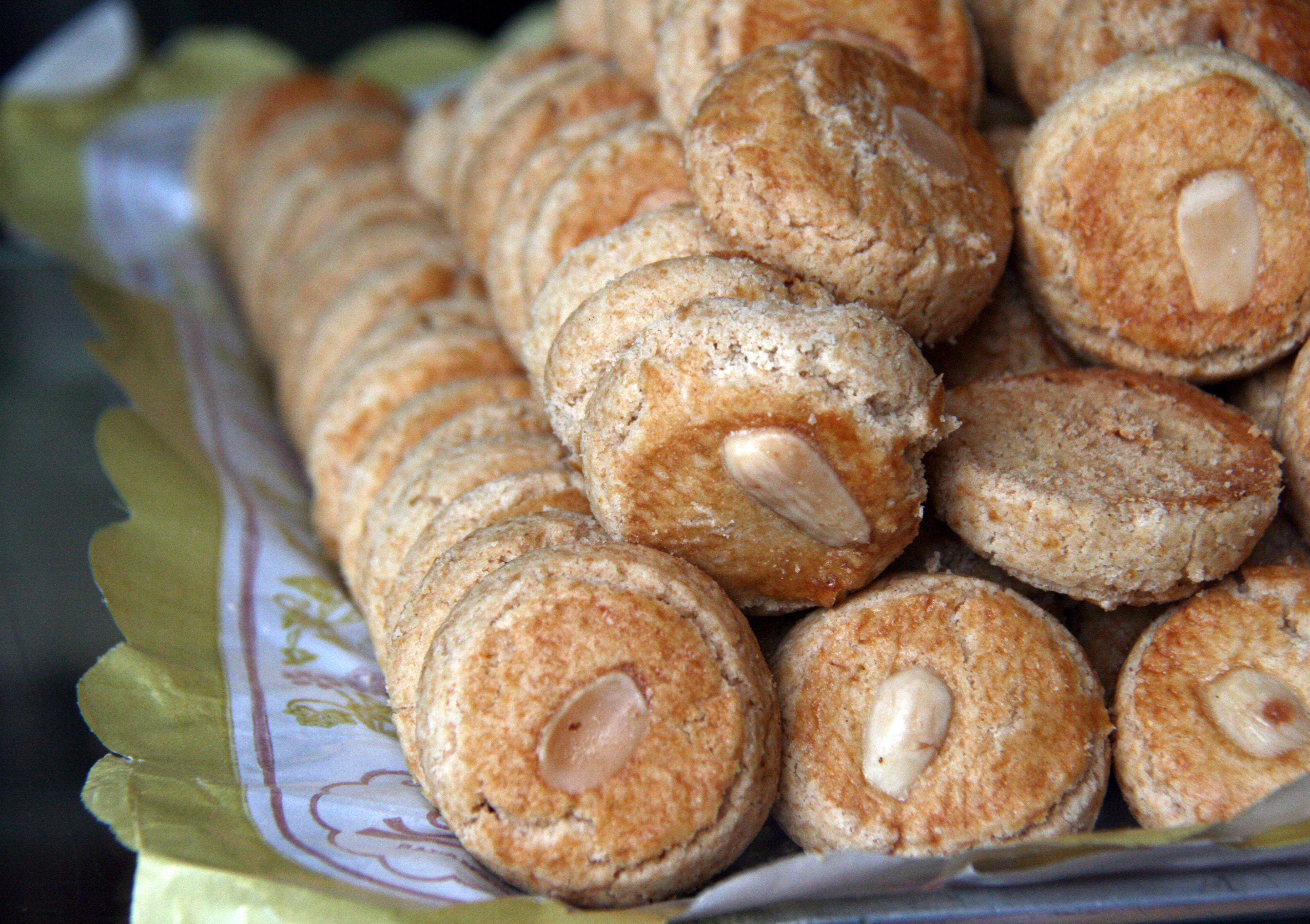 Perrunillas